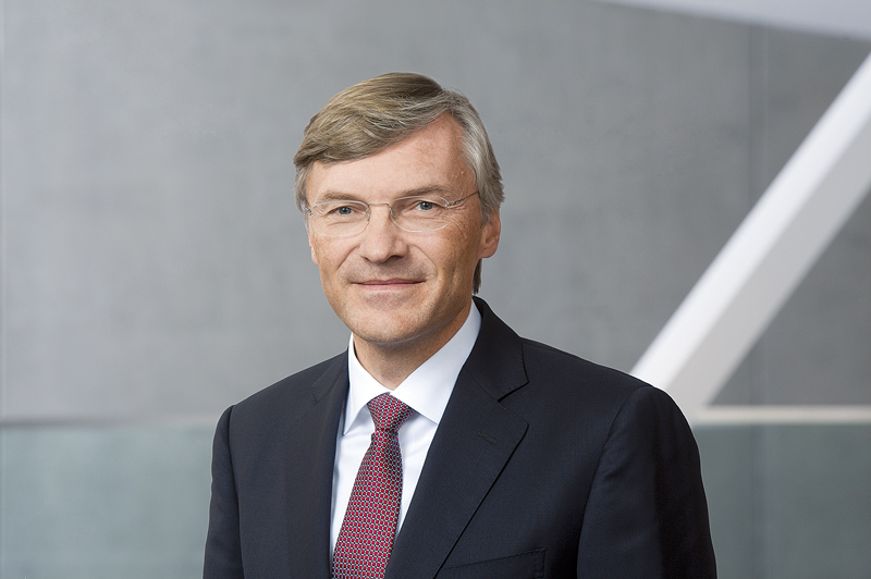 Vorsitzender der MAHLE Konzerngeschäftsführung